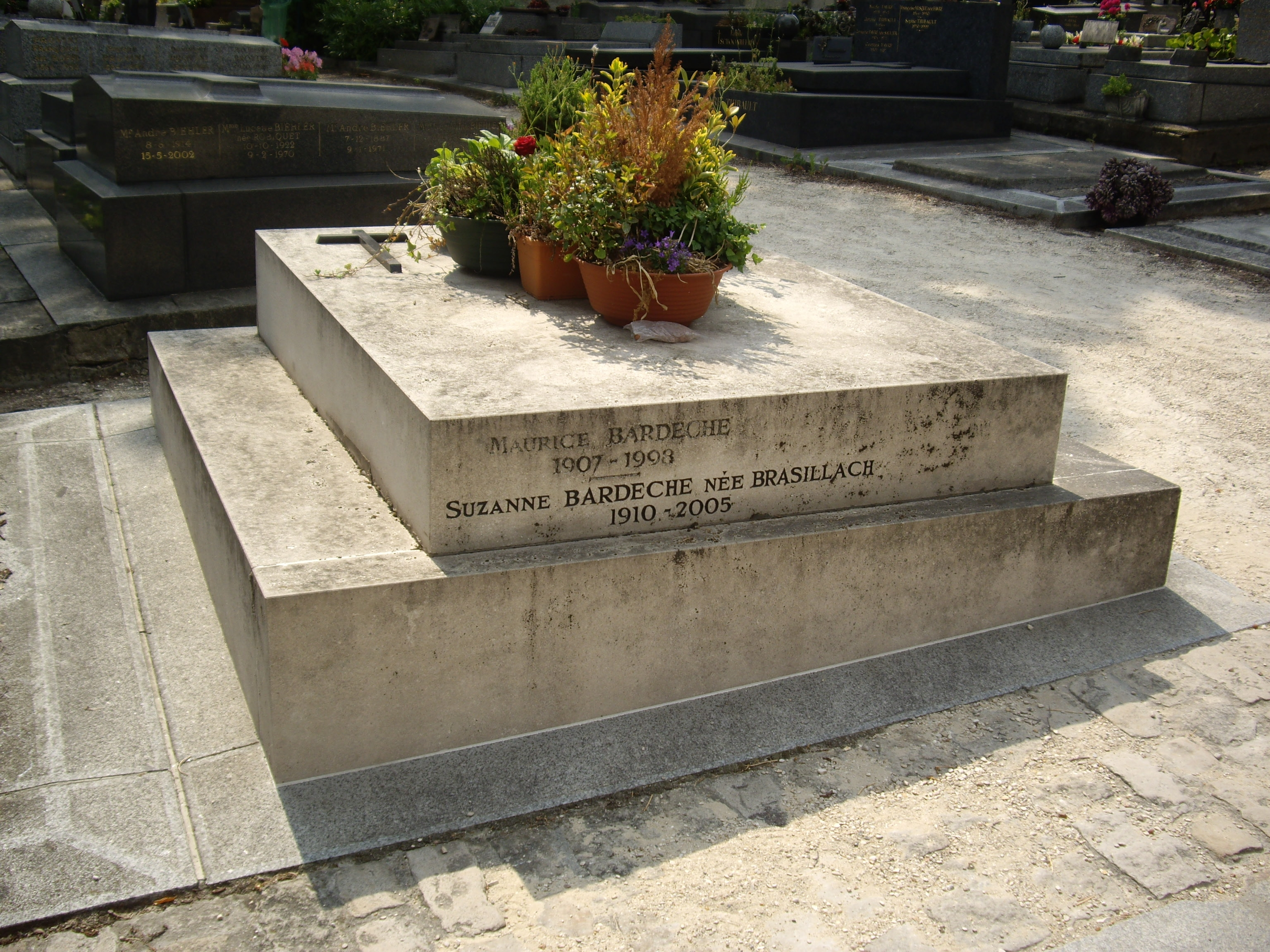 Tombe de Maurice Bardèche, cimetière de Charonne, Paris 20e.